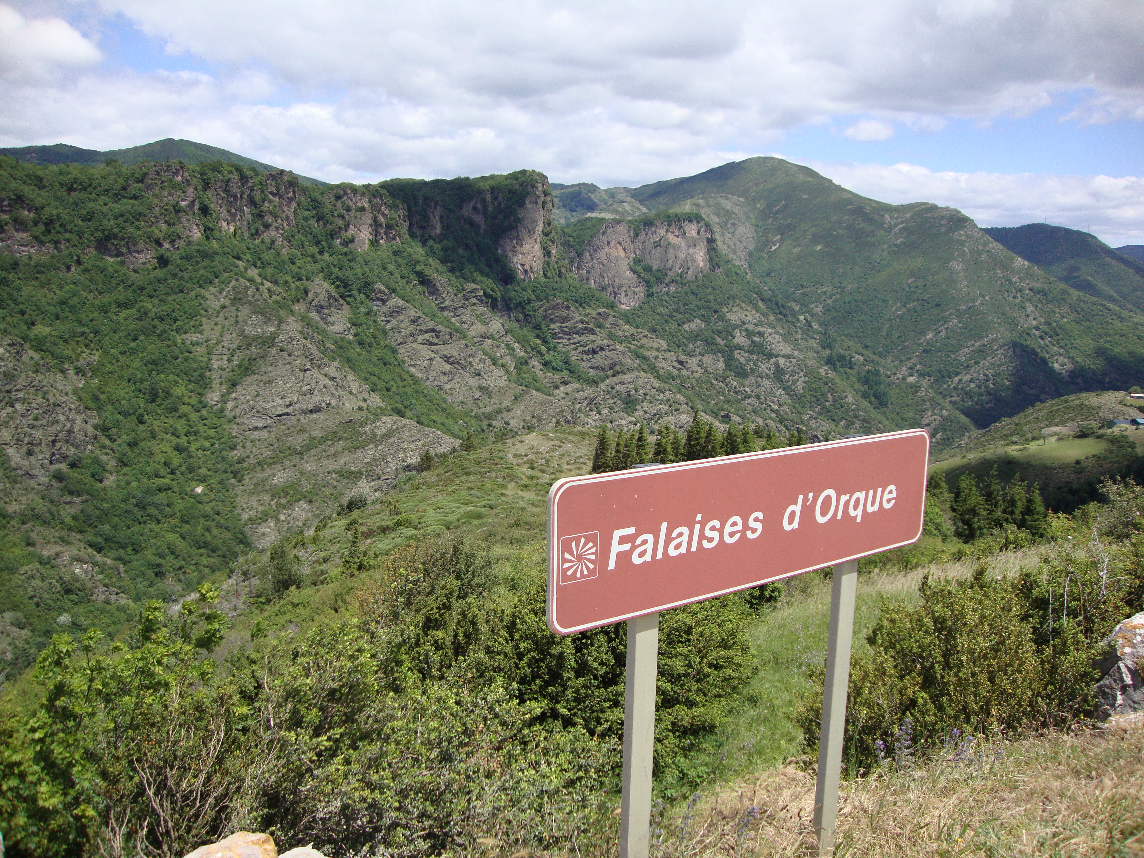 Castanet-le-Haut (Hérault, Fr) vue sur le Mont Marcou (1093 m) et les falaises d'OLQUE. L'IGN a retenu le nom d'OLQUE. De nombreuses preuves confirment que le nom historique est 'OLQUE' (depuis plus de 400 ans, dans des actes d'état civil, sur les cartes Cassini, sur le plan cadastral de 1820, etc... .